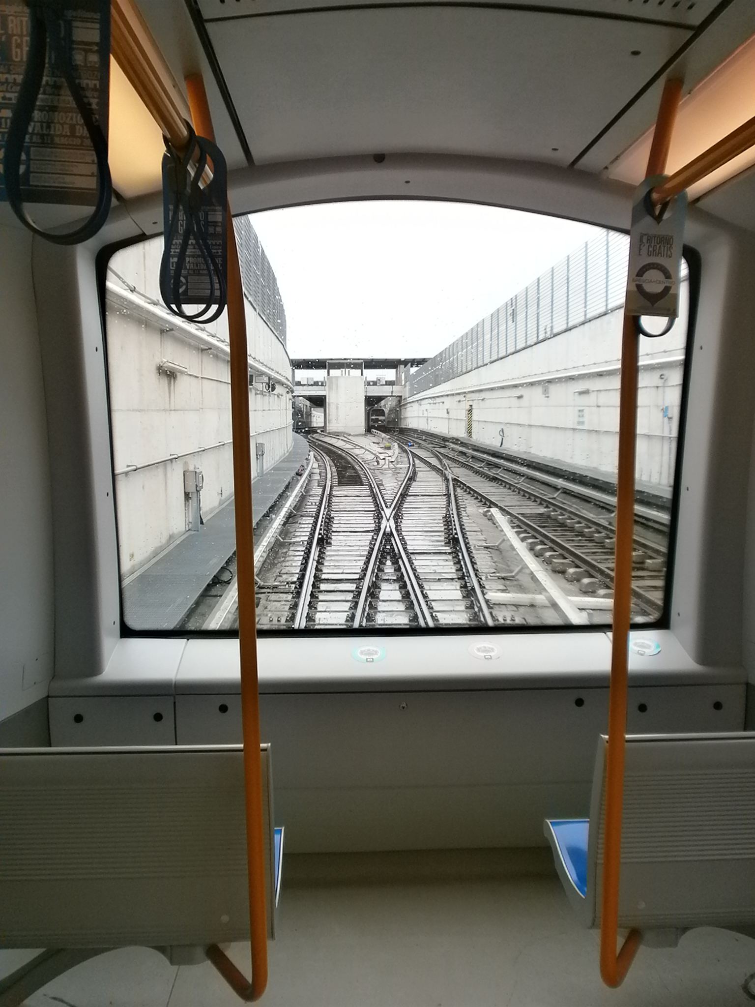 Metropolitana di Brescia - Metrò Automatico AnsaldoBreda